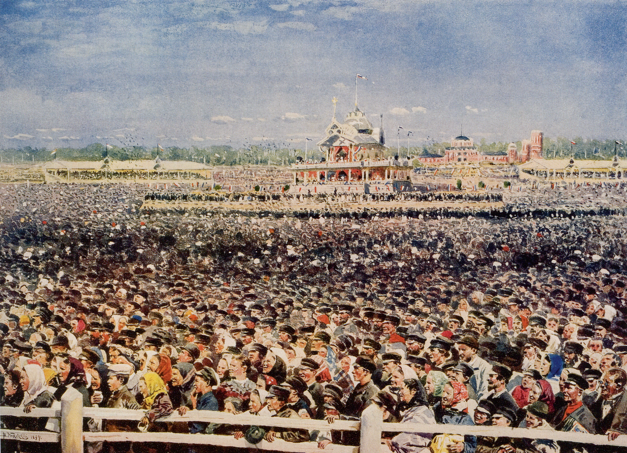 Das Volksfest auf dem Chodynka-Feld Mai 1896